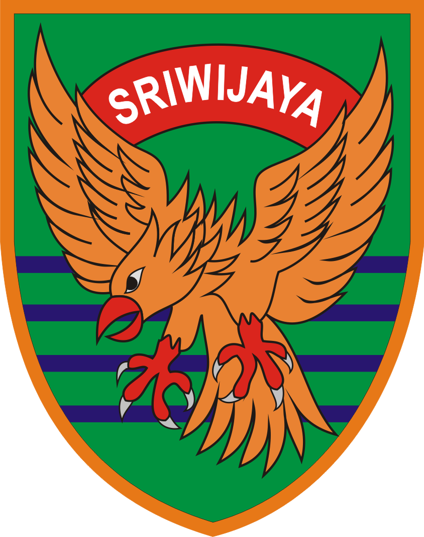 Gambar ini adalah Lambang Kodam II/Sriwijaya